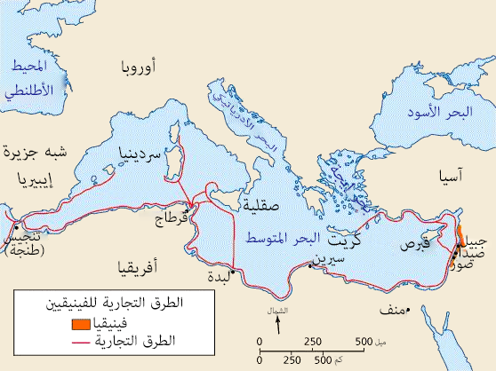 خريطة طرق التجارة الفينيقية في البحر المتوسط والتي تمر عبر جبيل وصيدا وصور وقرطاج. تمثل المدن في شمال إفريقيا وجنوب أوروبا مدى نفوذ الفينيقيين الممتد من مركزهم في شمال فلسطين. وقد انتشرت الحضارة الفينيقية عبر البحر المتوسط بين 1500 ق.م و 300 ق.م.